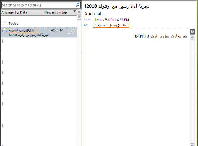 لقطة شاشة لتجربة أداة رسيل على آوتلوك 2010